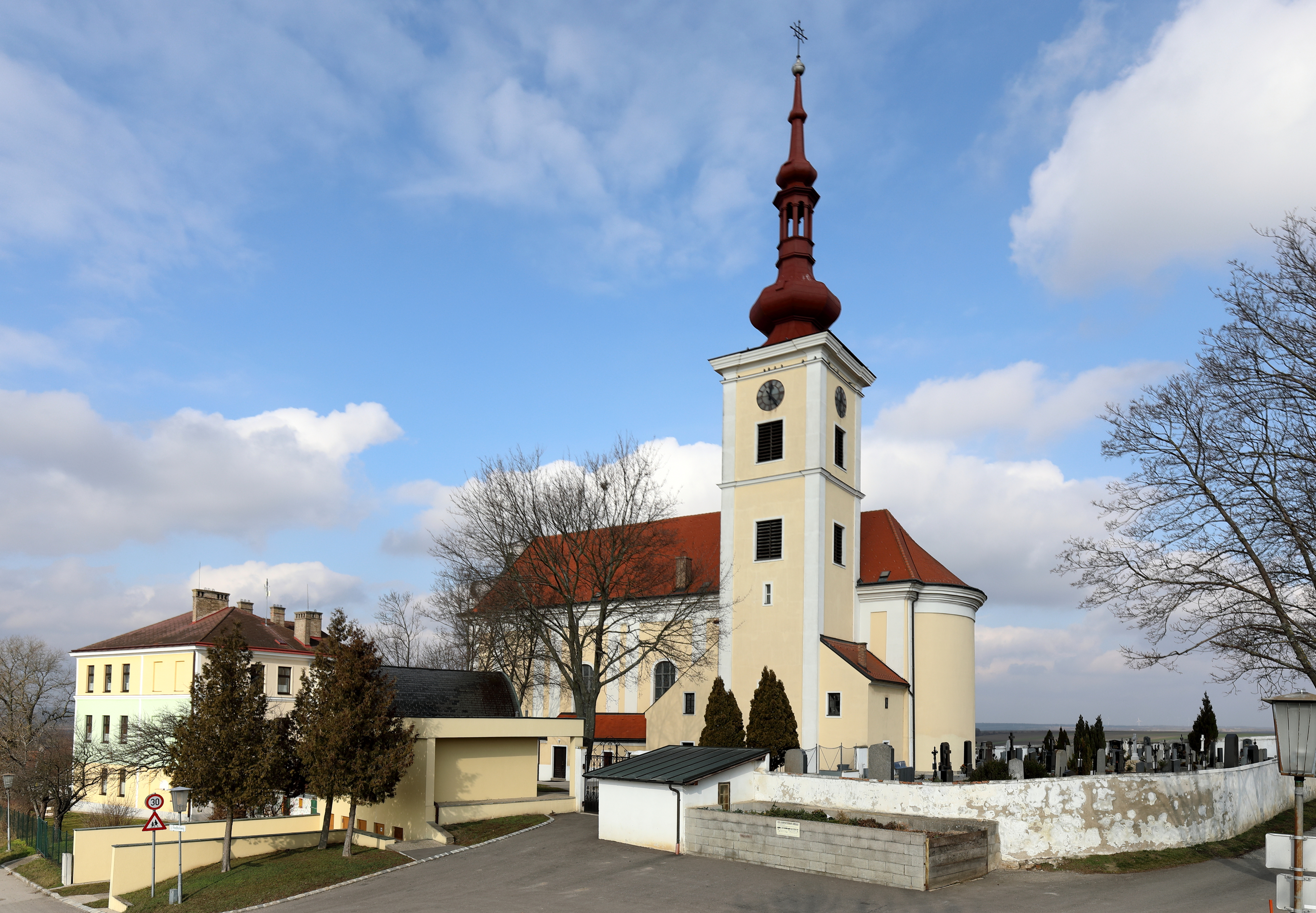 Südansicht der katholischen Pfarrkirche Hl. Kreuz in der niederösterreichischen Marktgemeinde Hohenruppersdorf mit Friedhof und links dem Gebäude der neuen Mittelschule. Die Kirche ist ein in erhöhter Lage von 1788 bis 1790 errichteter barocker Sakralbau mit einem mächtigen Südturm, der im Kern mittelalterlich ist.